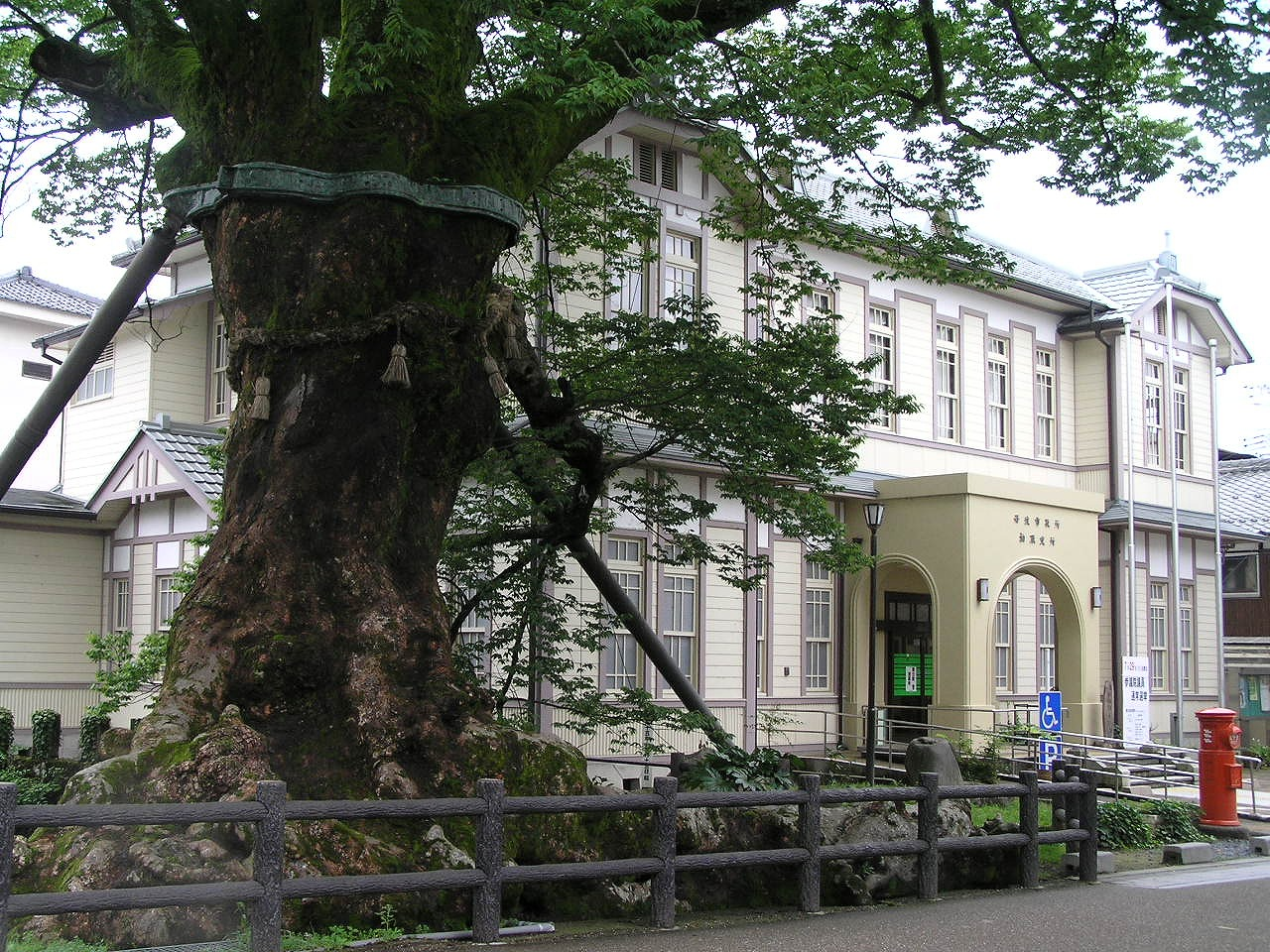 兵庫県丹波市柏原 木の根橋と旧・柏原町役場 (Zelkova serrata) (ID - Djlayton4)